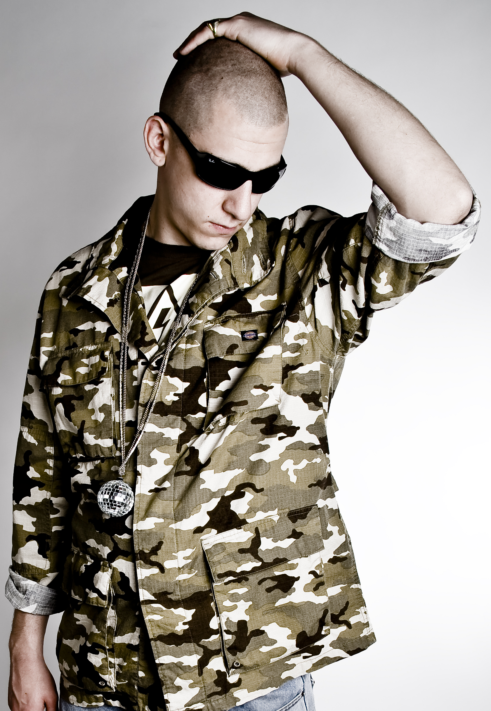 foto von jayjay